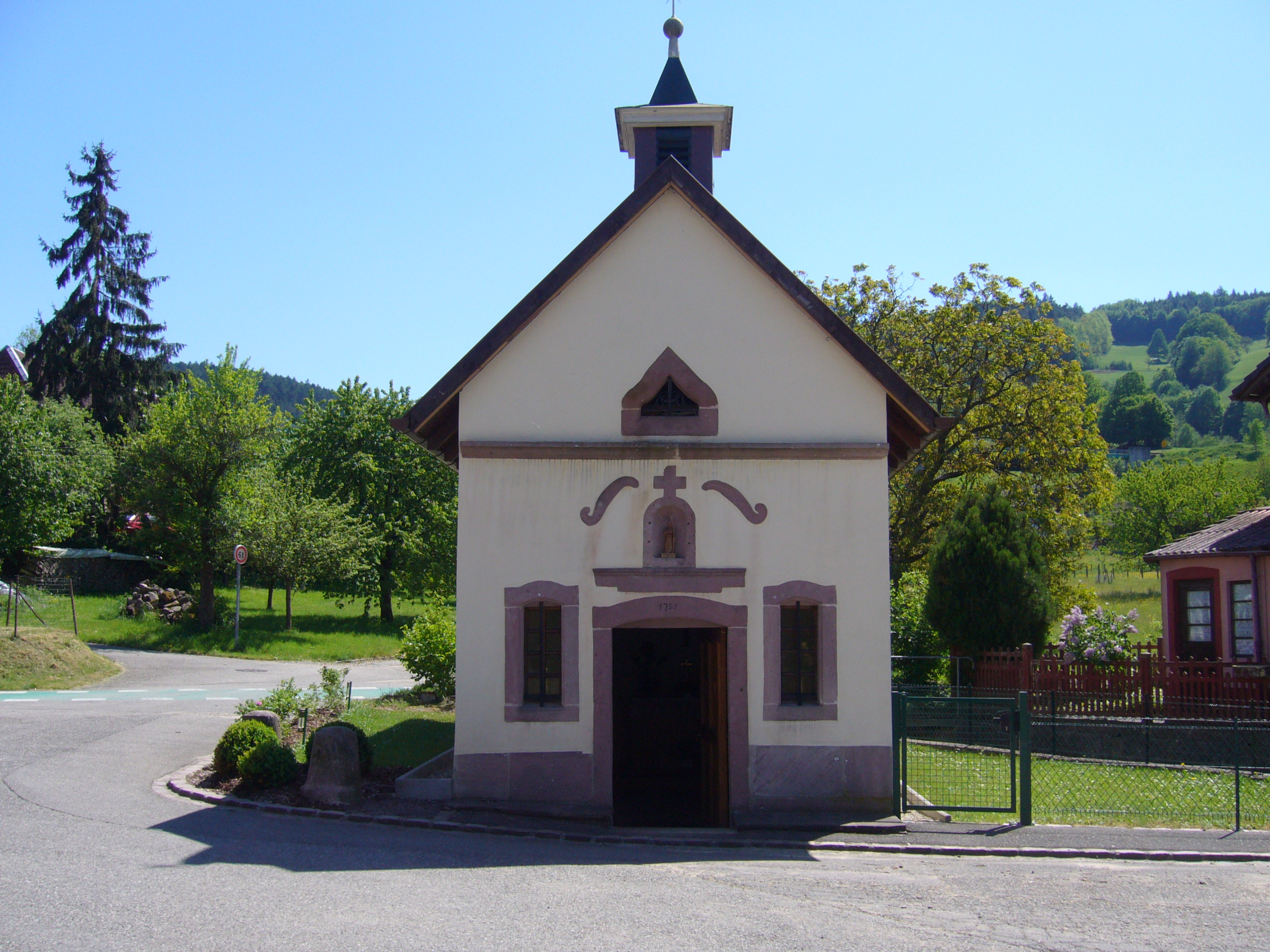 Chapelle de Saint-Blaise à Sainte Croix-aux-Mines 189.JP